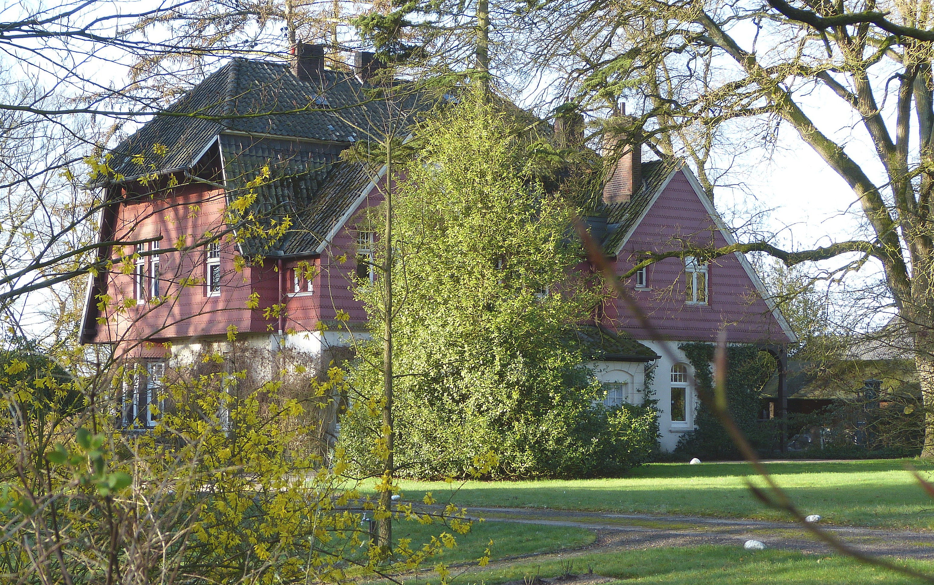 Haus Mindeströmmen in Bremen, Lesmonastraße 70, NordostansichtDas abgebildete Objekt ist ein geschütztes Kulturdenkmal in der Freien Hansestadt Bremen, mit der Nr. 1296 beim Landesamt für Denkmalpflege registriert.